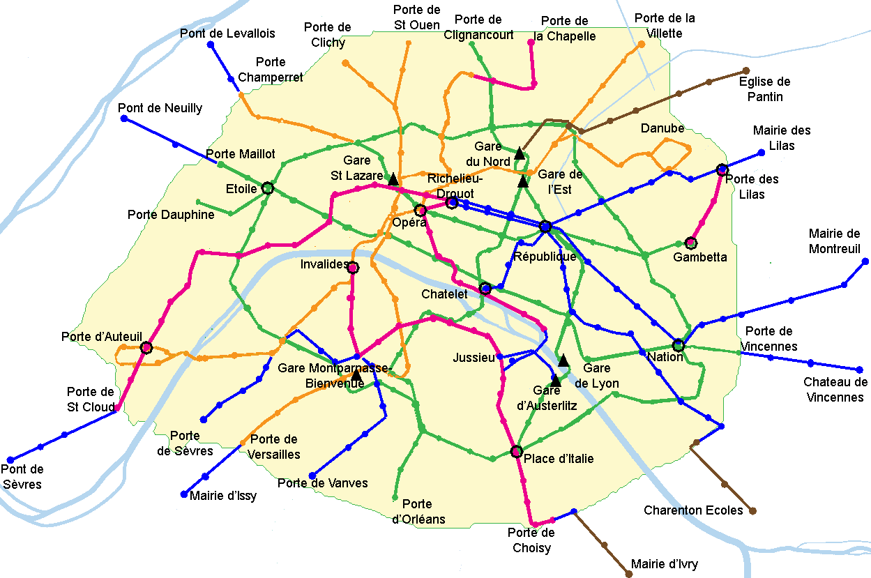 Description : Carte du métro de Paris avant 1949 1900-1910, 1910-1914, 1914-1930, 1930-1939, 1939-1949 Place : Paris, France Date : Octobre 2006 Auteur : Réalisation Pline